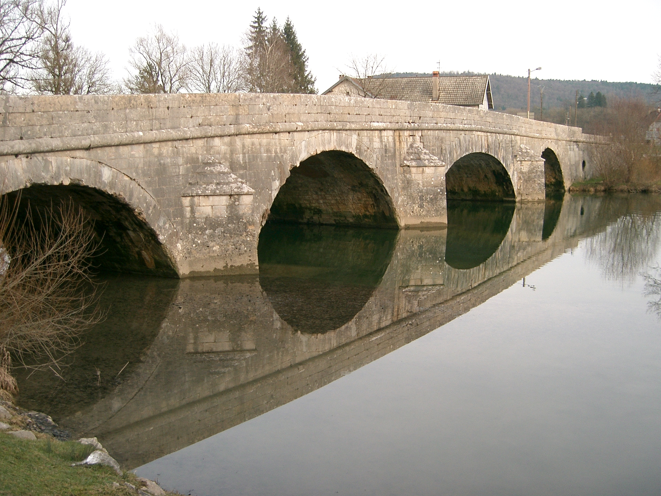 Pont de Pont-du-Navoy sur l'Ain (portée de 51 m), département du Jura (France)- Pont du XVIIIe siècle.